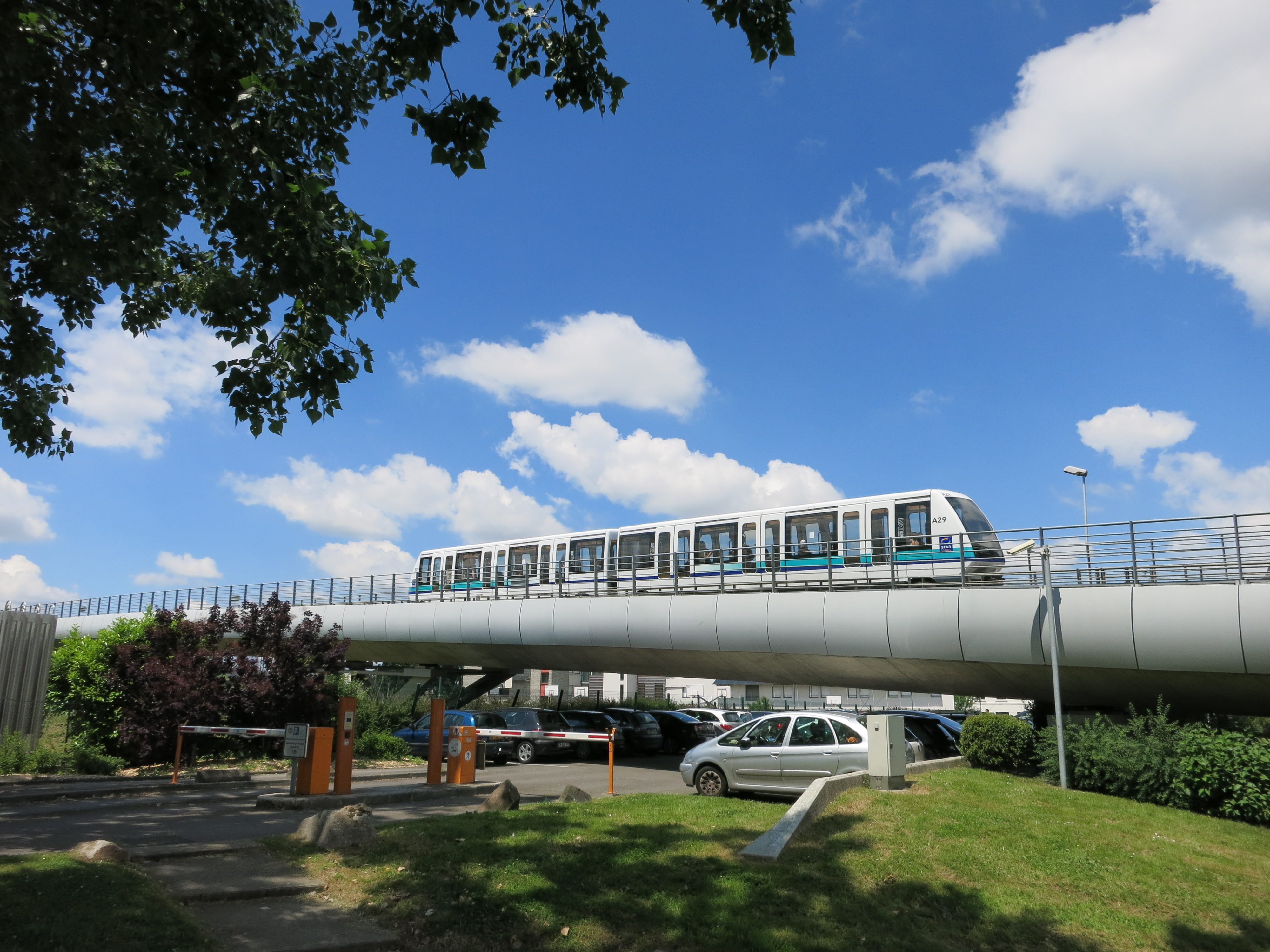 Fahrzeug der Métro Rennes auf dem Hochbahnabschnitt zwischen den Stationen Pontchaillou und Anatole France (Linie a)